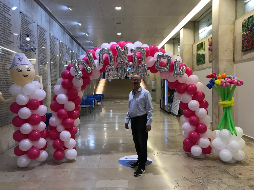 האח איאד אבו סארה בחגיגות יום האחות במלר"ד הר הצופים